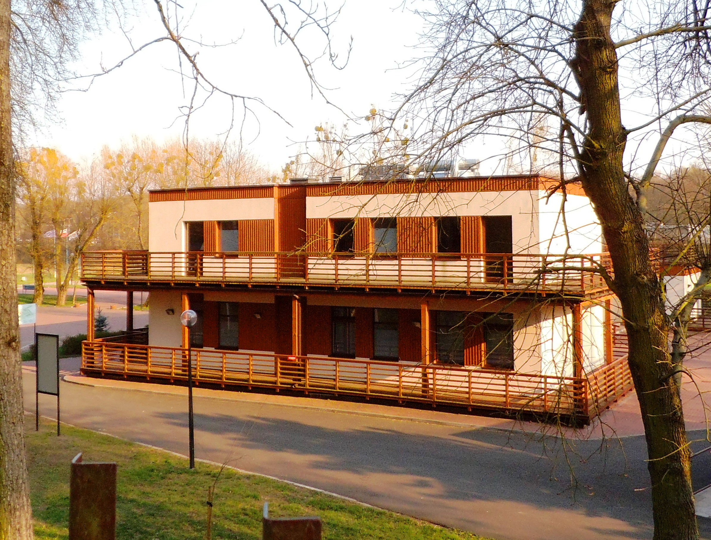 Camping Tramp w Toruniu1